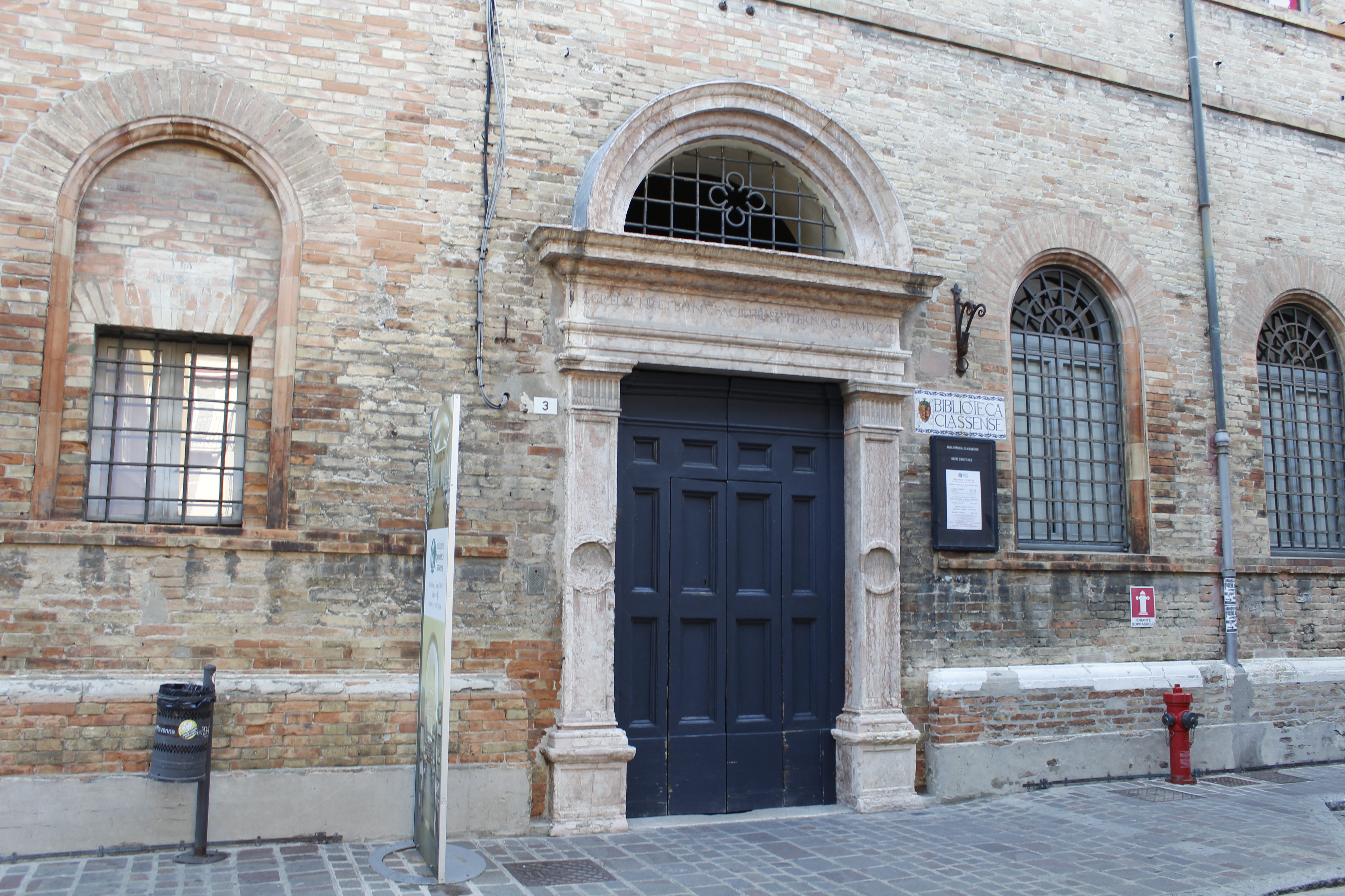 Ingresso della biblioteca Classense, Ravenna